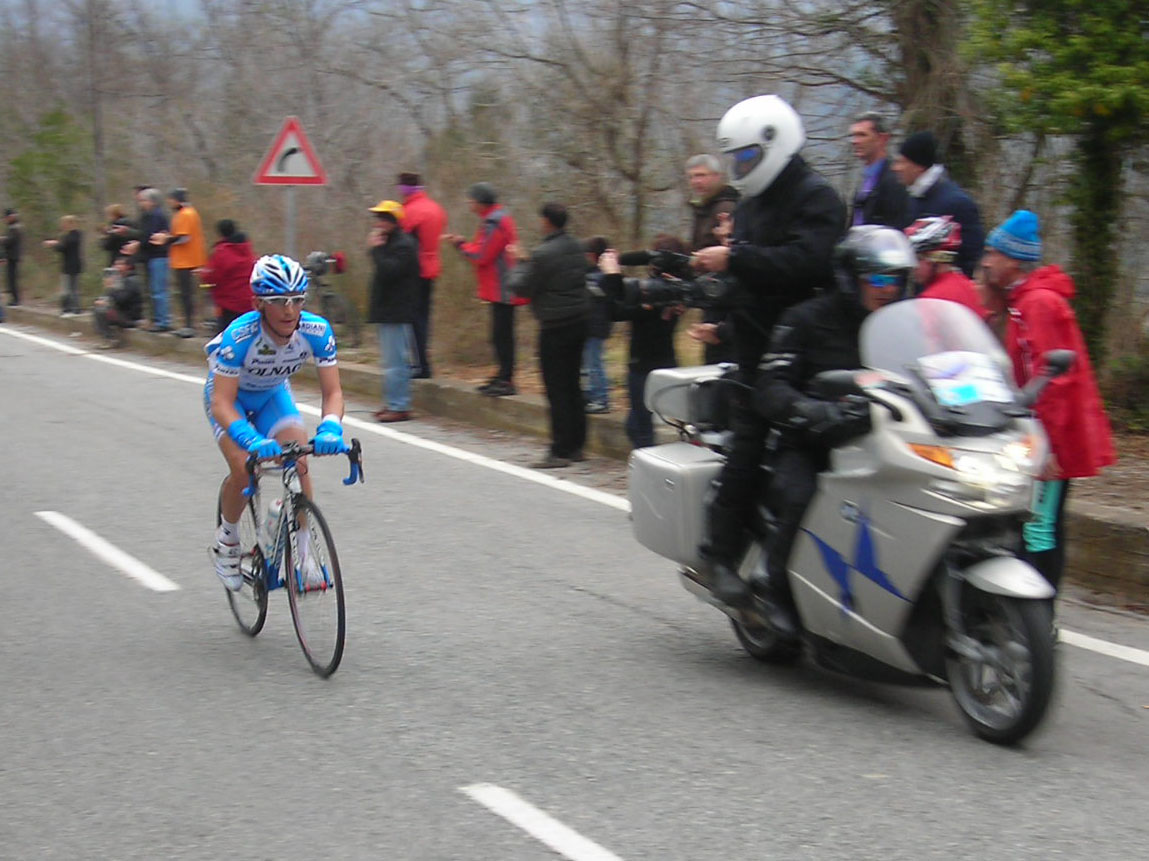 Angelo Pagani, il primo sulle Manie alla Milano-Sanremo 2012